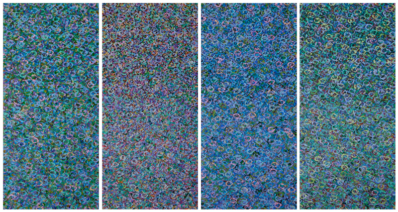 Polyptyque réalisé par l'artiste Achot Achot, se trouvant actuellement au Musée de l'Orangerie.